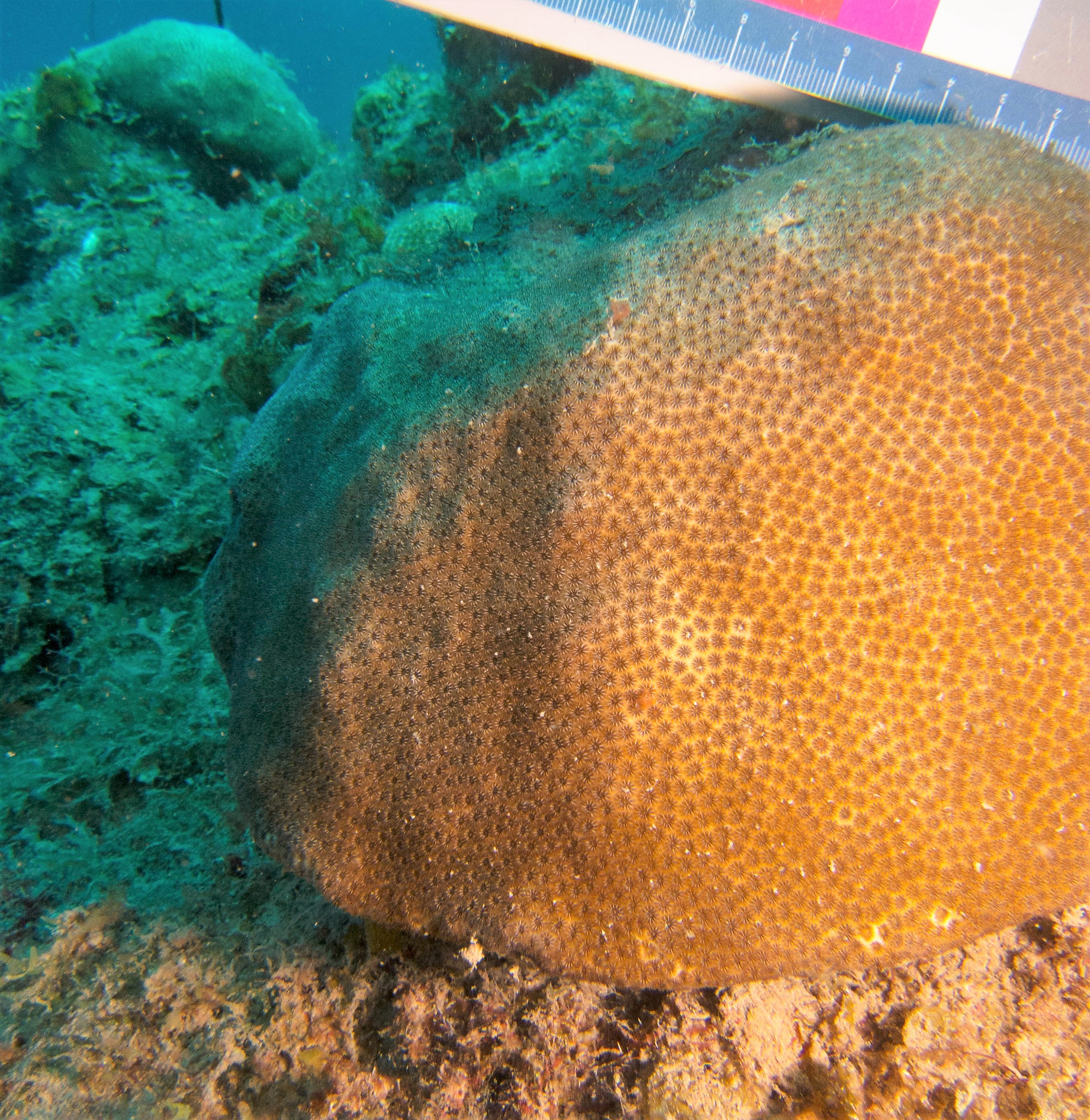 Stephanocoenia intersepta, en Curaçao